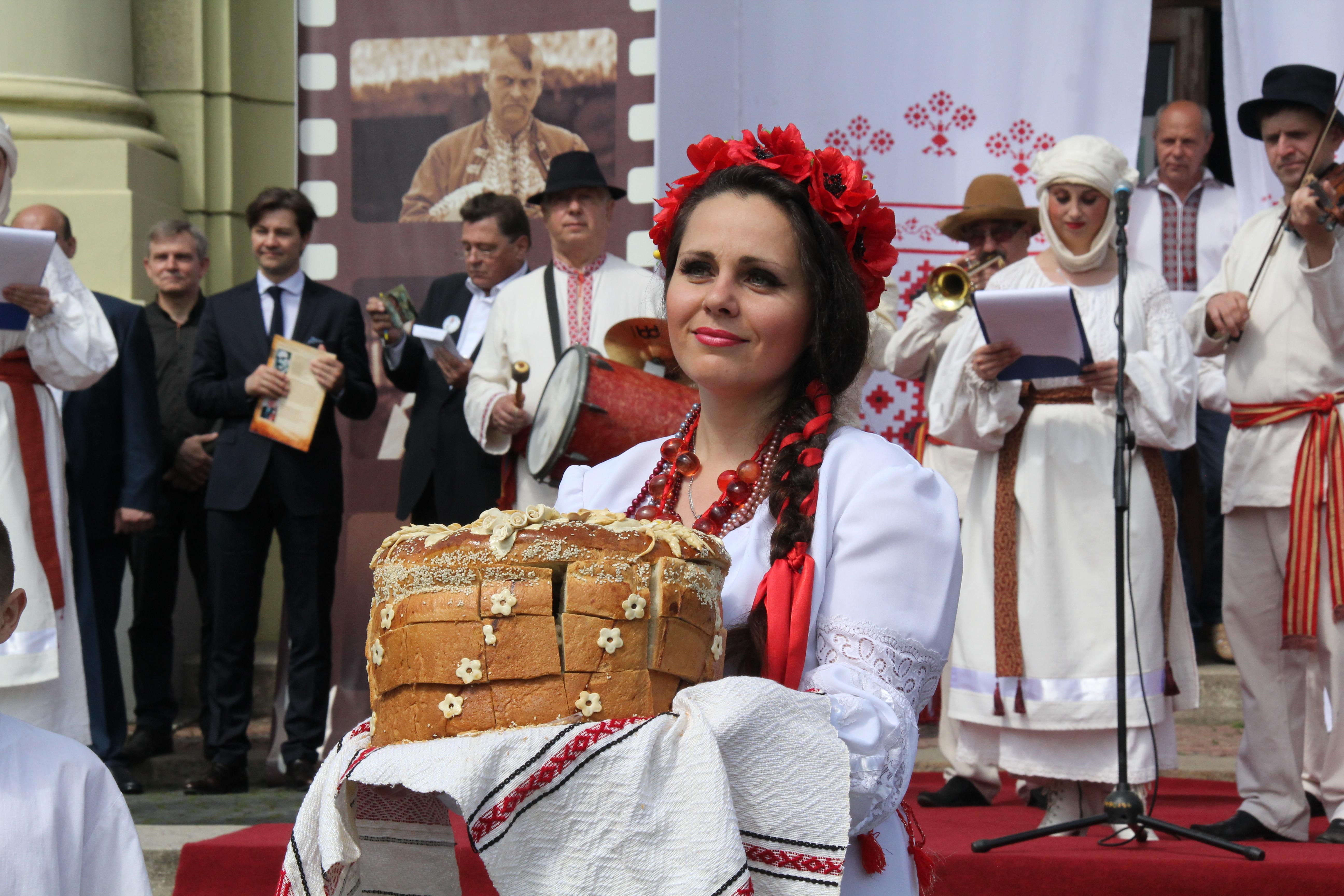 Театралізований виступ на Театральній площі у Чернівцях начесть 75-річчя Івана Миколайчука.